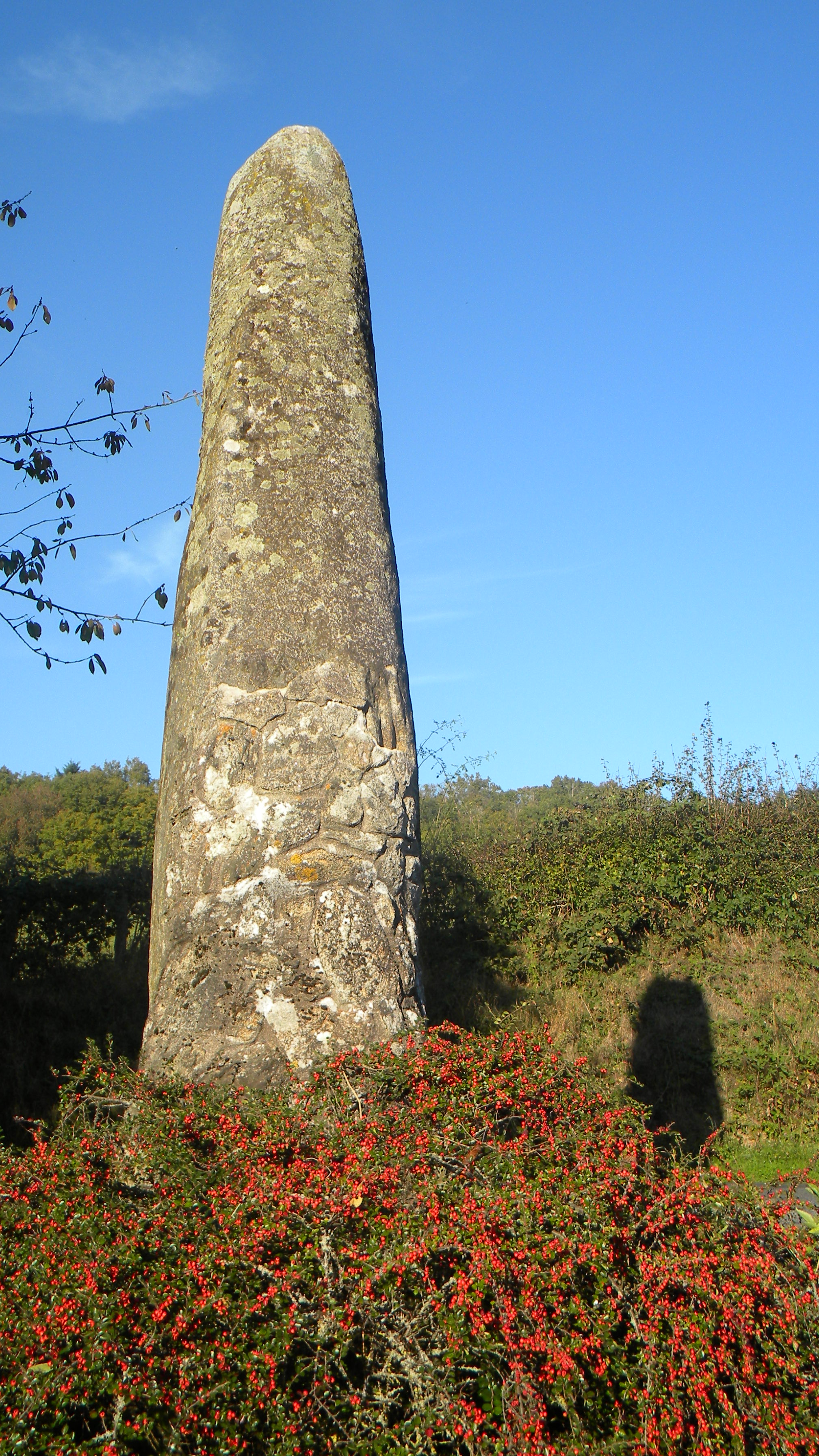 Menhiro de Broye